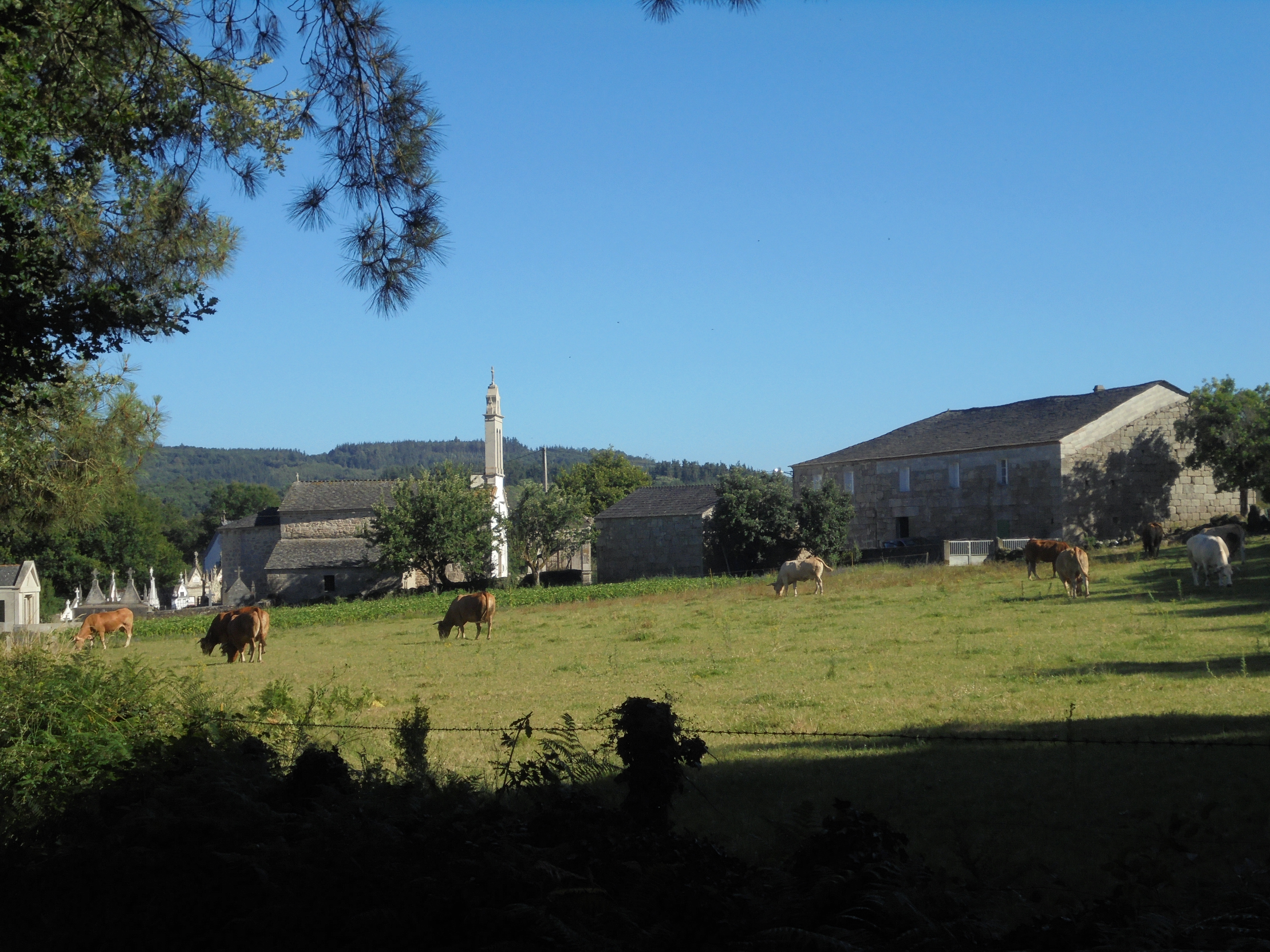 Vista de Goméan ( O Corgo)